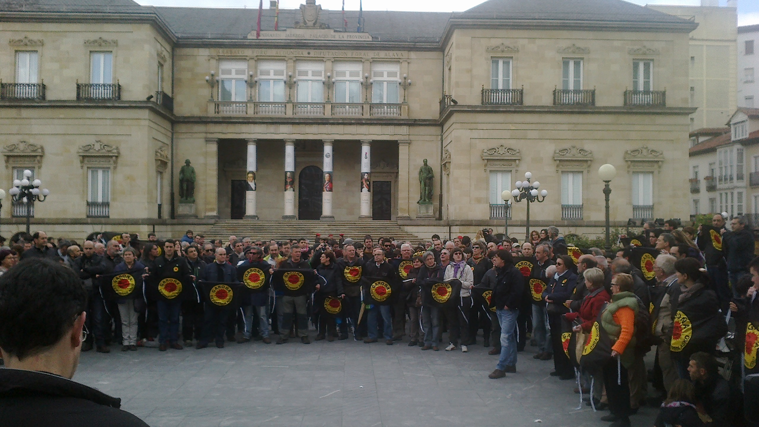 Garoñako zentral nuklearra ez ixteko erabakiaren aurkako elkarretaratzea, Gasteizen, 2013ko maiatzaren 25ean